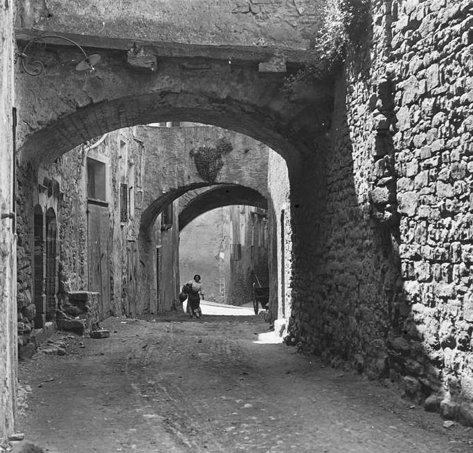 Carrer amb volta. Josep Salvany i Blanch (1913)